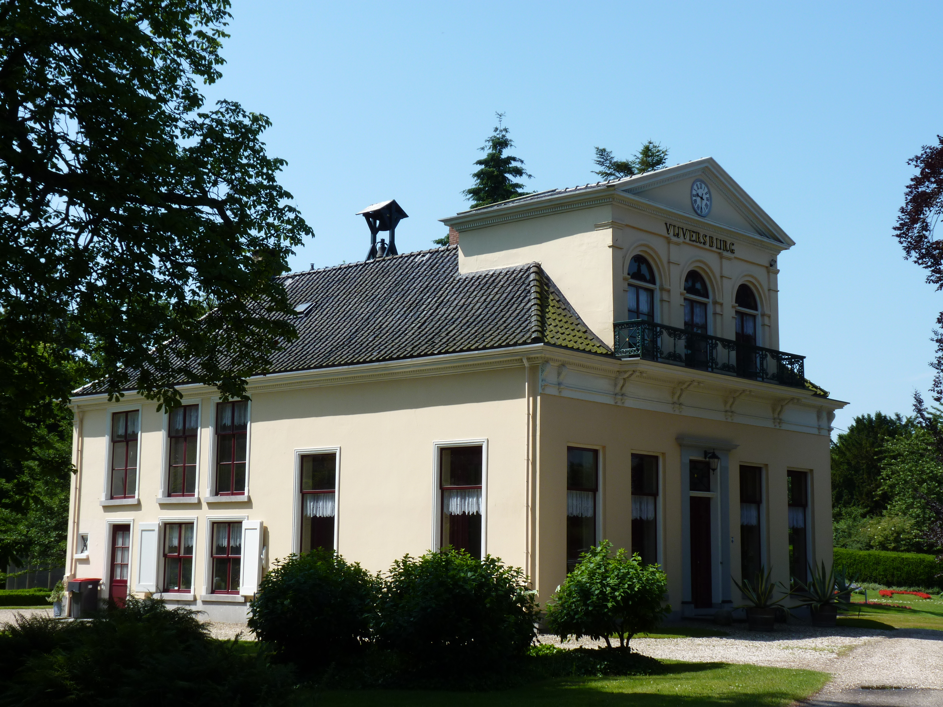 Tietjerk Vijversburg 2010